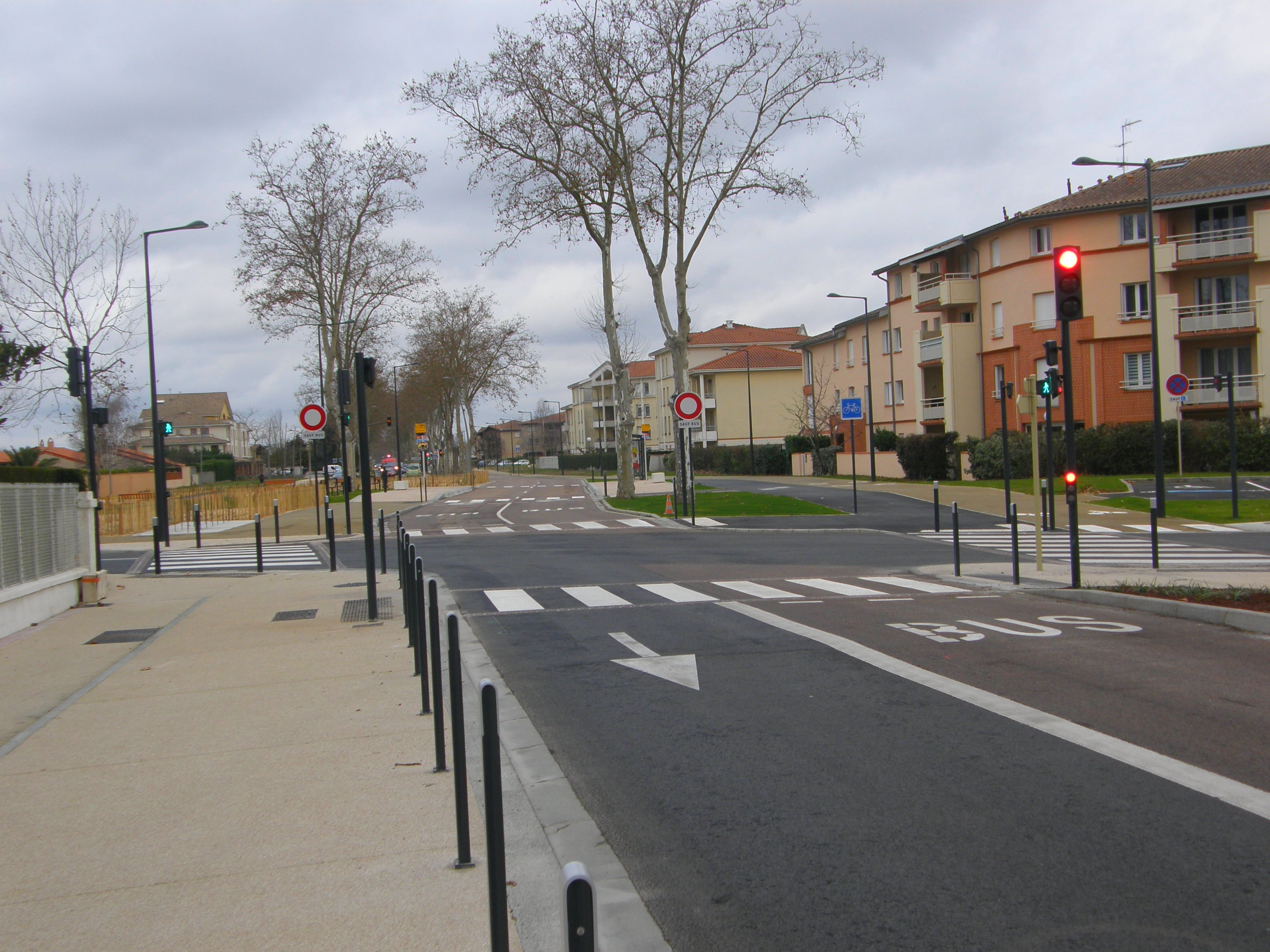 La station Prat Dessus des lignes L3 et 116 du réseau Linéo et des bus de Toulouse en sortant du centre-ville de Plaisance-du-Touch.